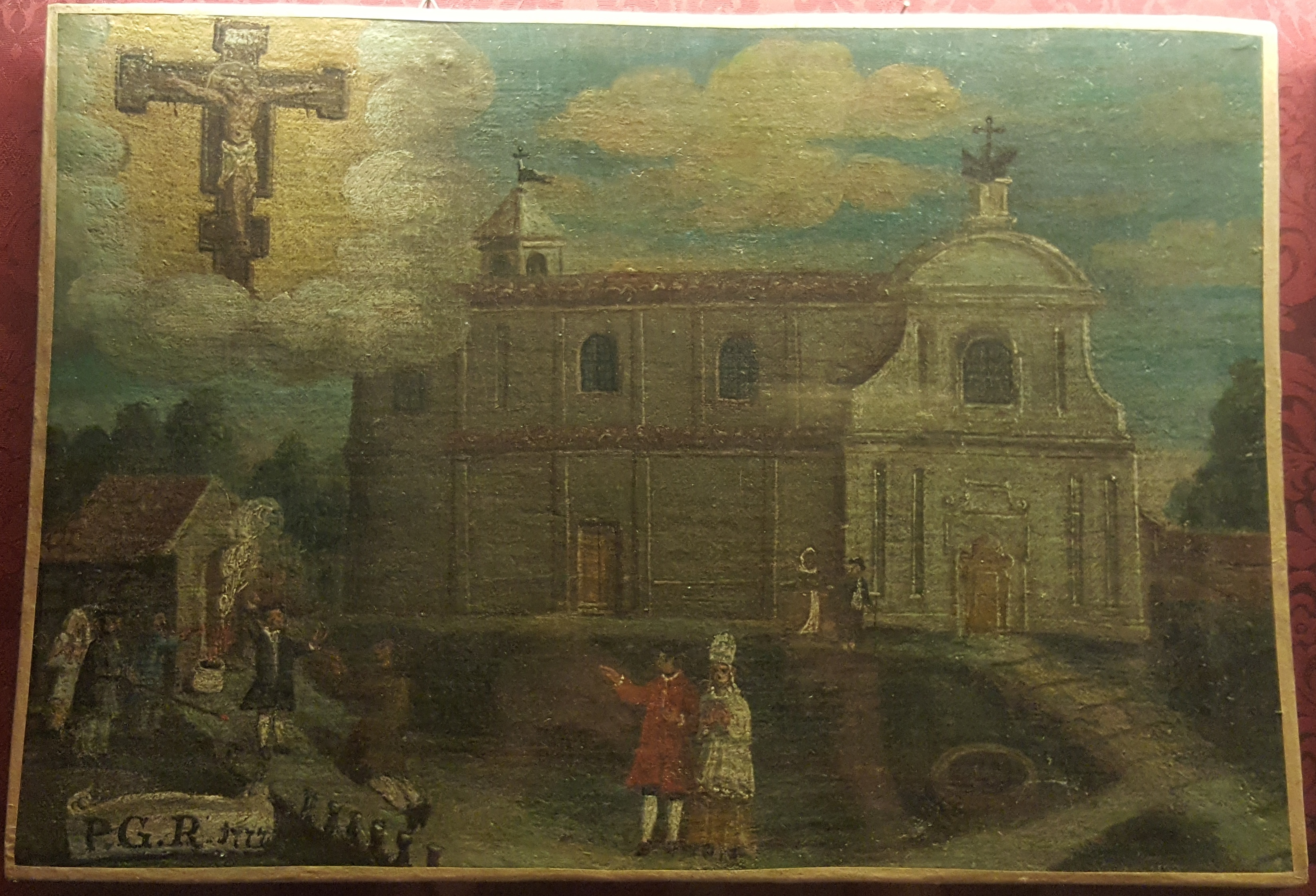 Ex voto raffigurante il Santuario del Santissimo Crocifisso This is a photo of a monument which is part of cultural heritage of Italy.